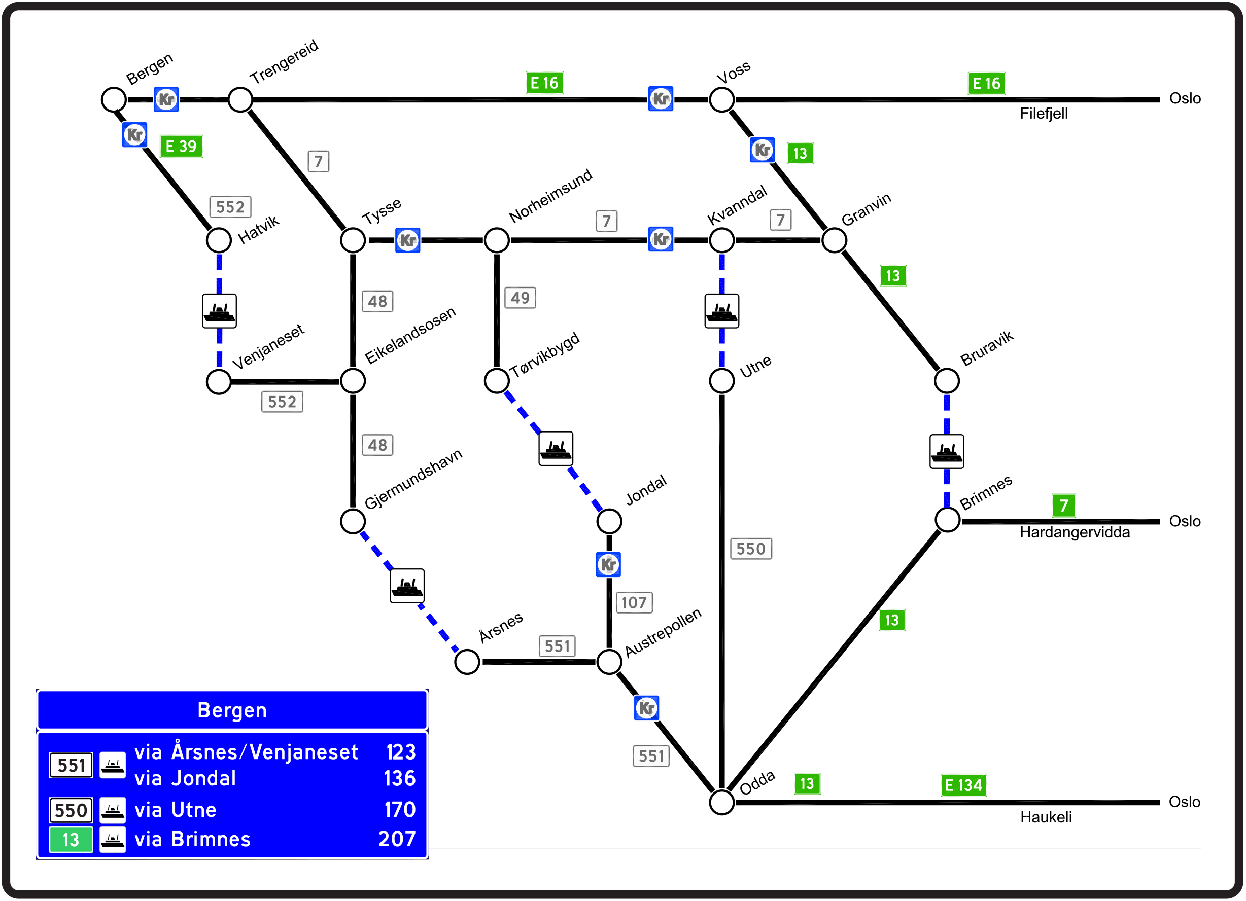 Skiltplan satt opp i Jøsendalen over vegalternativa mot Bergen.